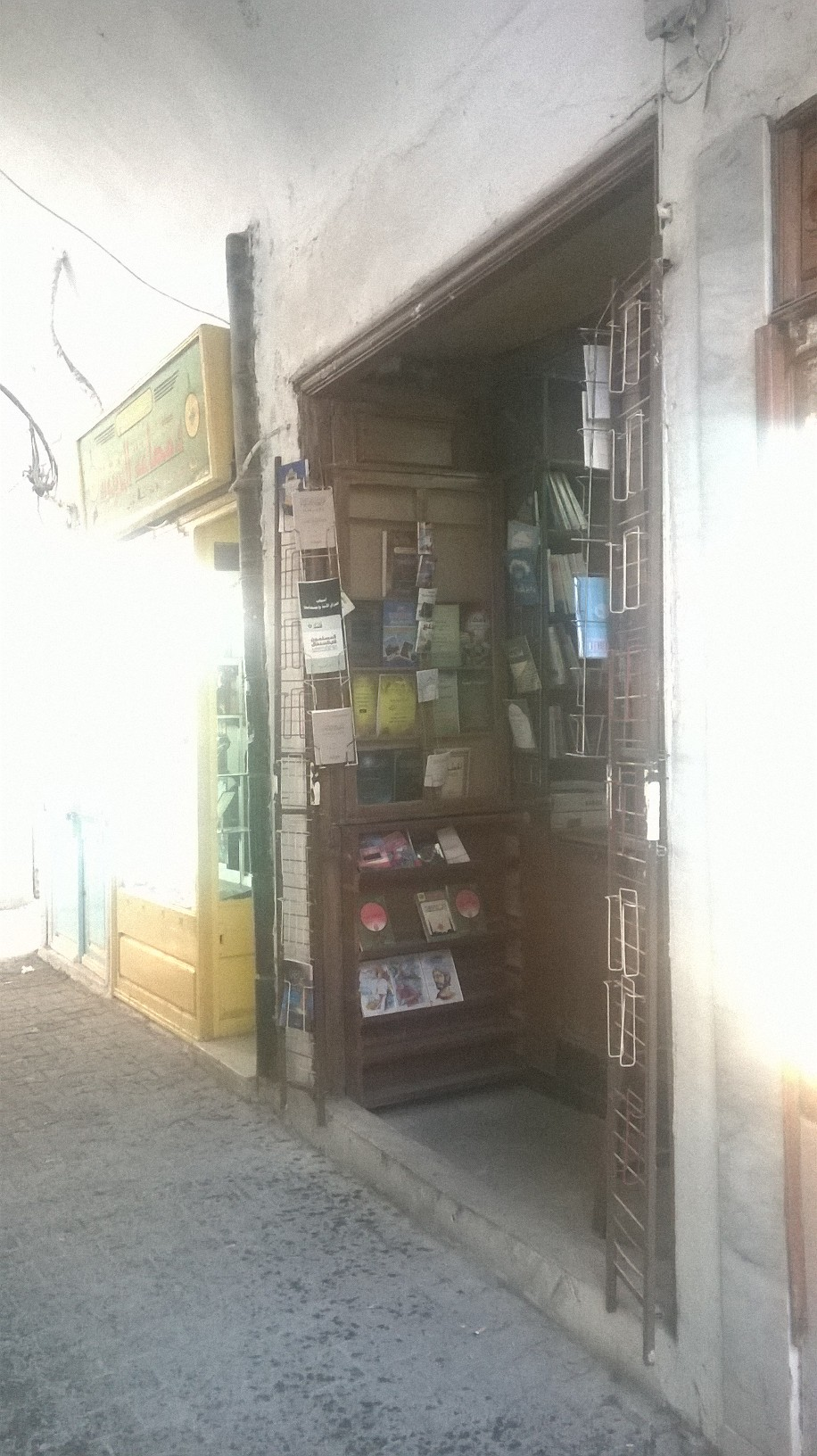 La médina de Tunis مدينة تونس العتيقة